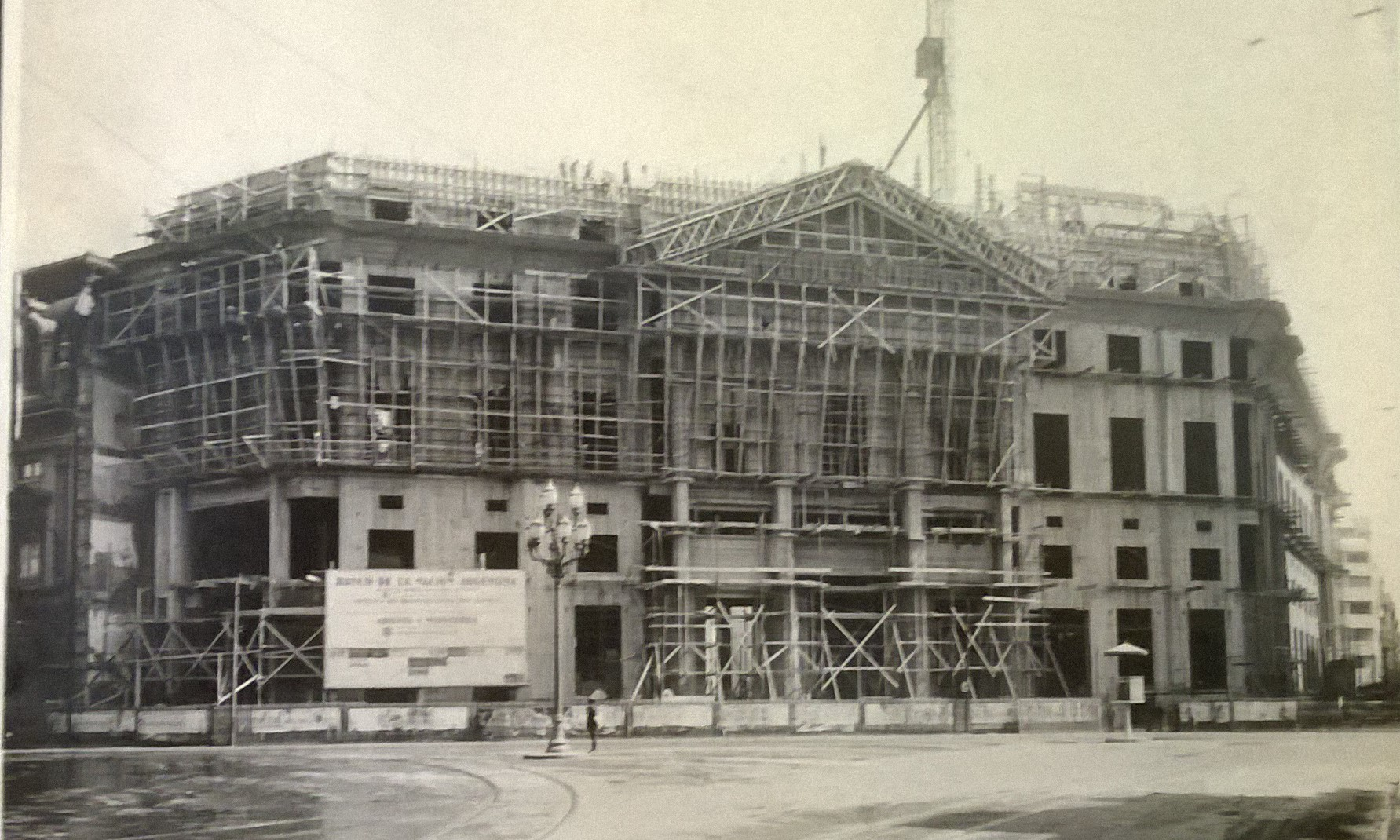 Fachada en construcción del Banco Nación, alrededor de 1942.